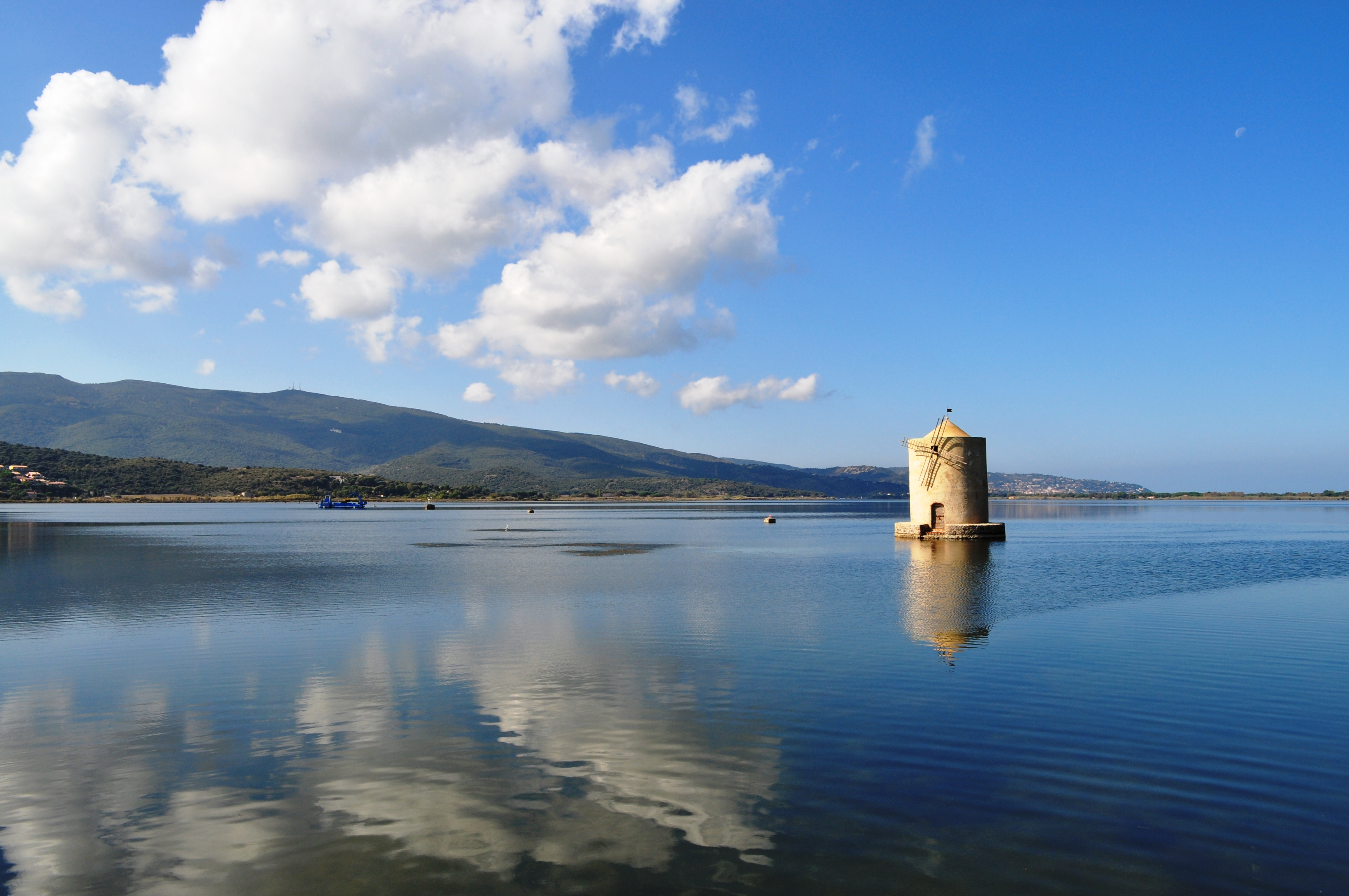 Riserva naturale Laguna di Orbetello di Ponente This is a photo of a monument which is part of cultural heritage of Italy. The authorisation for taking photos of this object was provided by the World Wide Fund for Nature Italy.